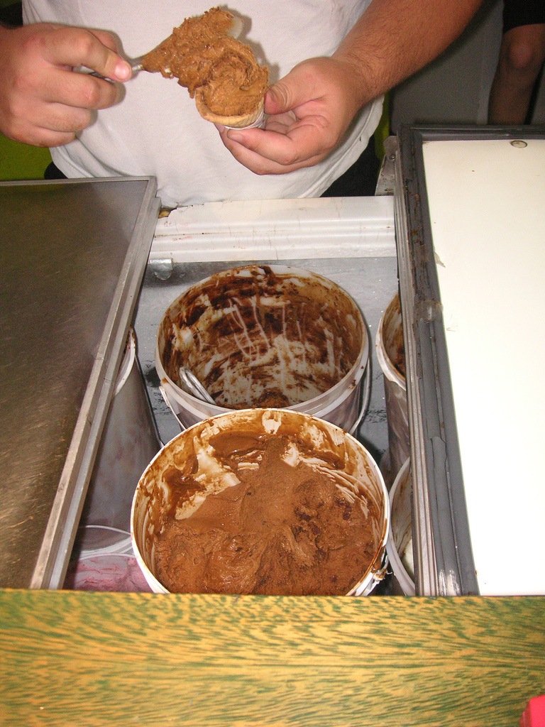 Dulce de Leche flavored icecream. Buenos Aires, Argentina.